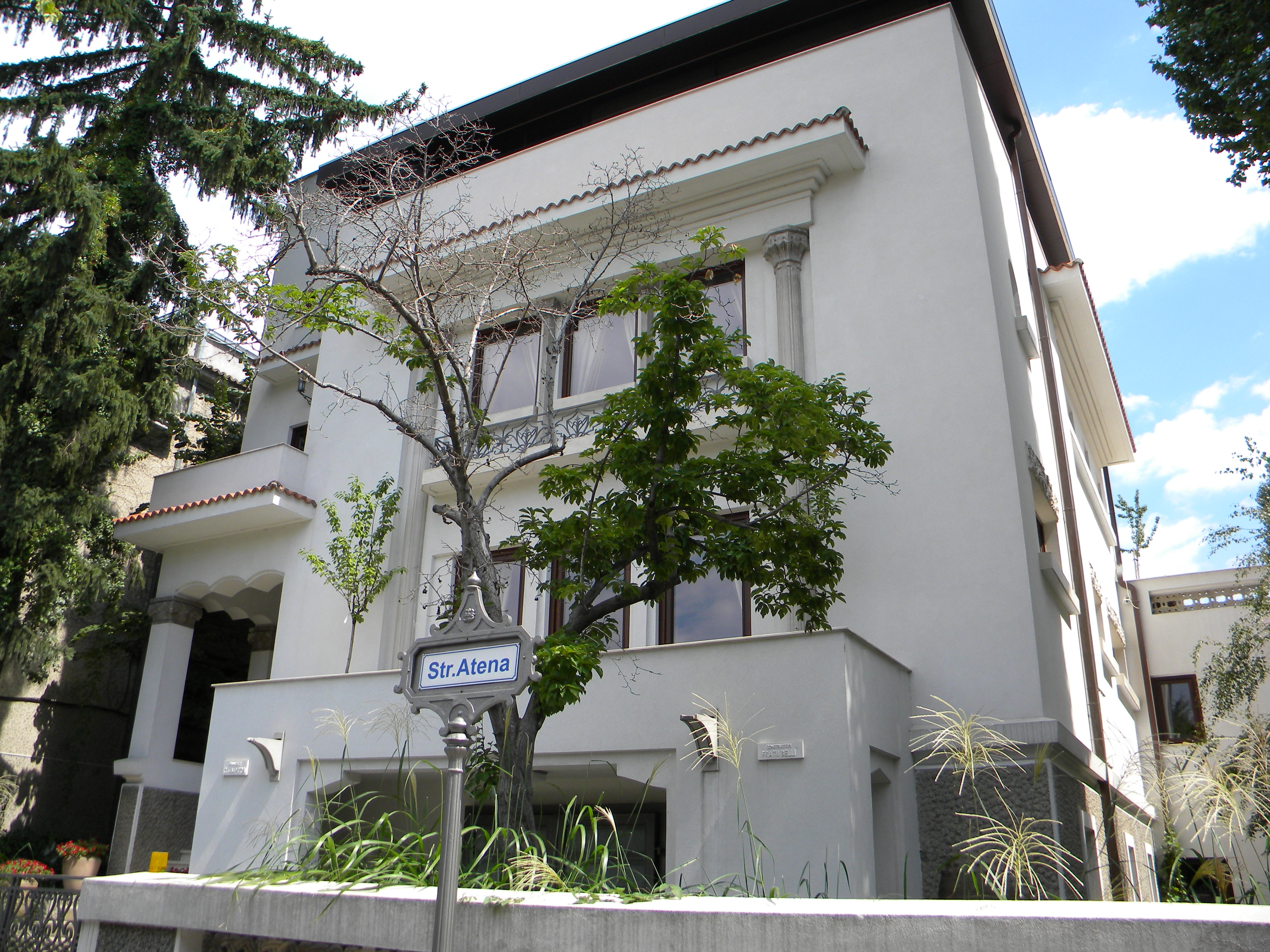 Imobil pe Str. Atena, nr. 20 Bucuresti sect 1(detaliu)